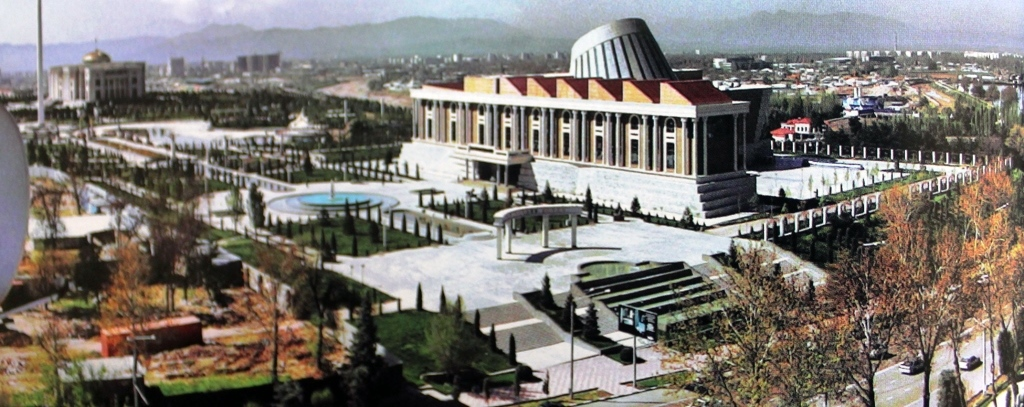 Национальный музей Таджикистана - новое здание музея, 2013 год, Душанбе